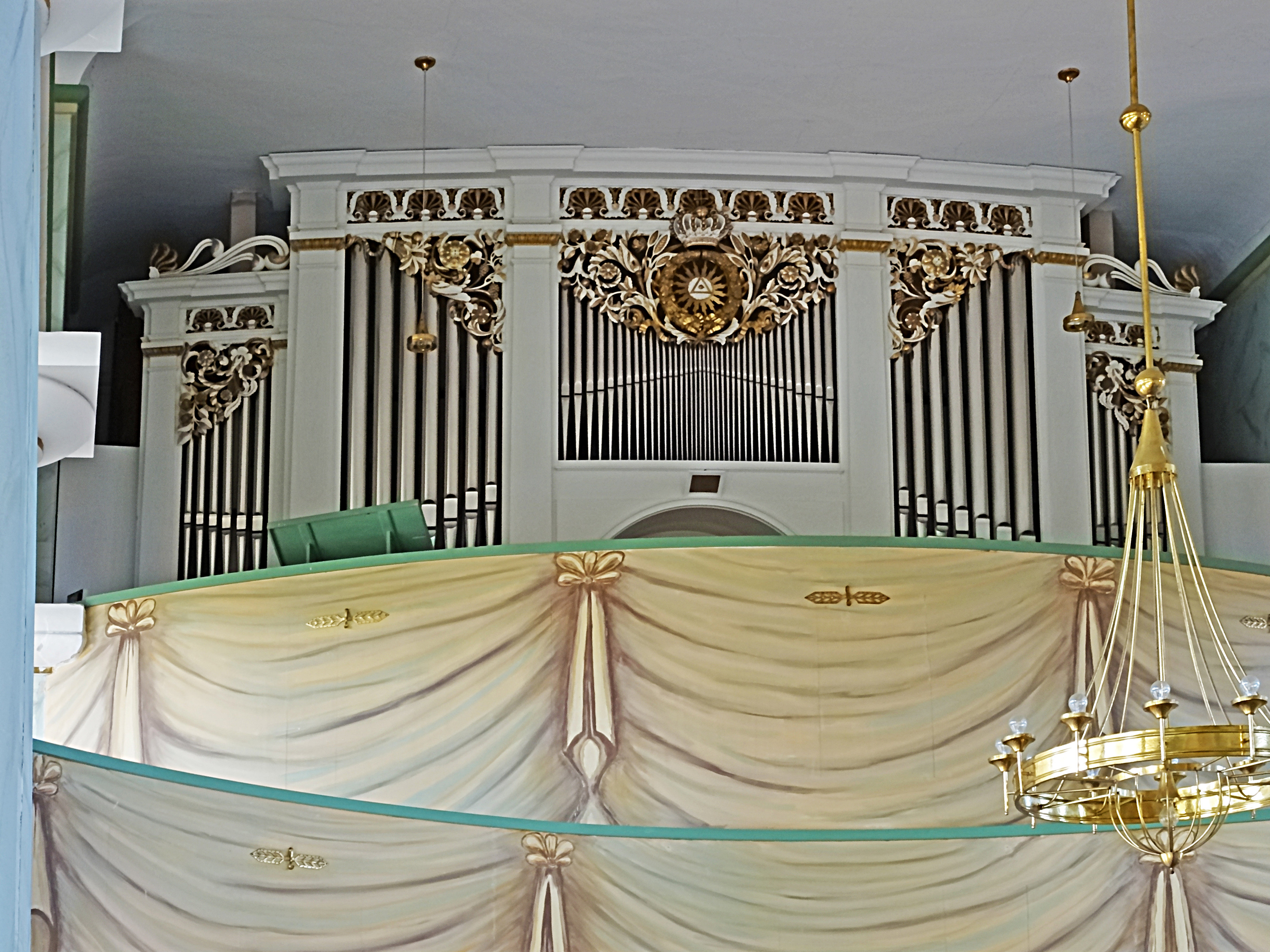 Orgel von Johann Friedrich Schulze (1830) in der Kirche zu Gräfinau-Angstedt, restauriert 2006 von Orgelbau Schönefeld